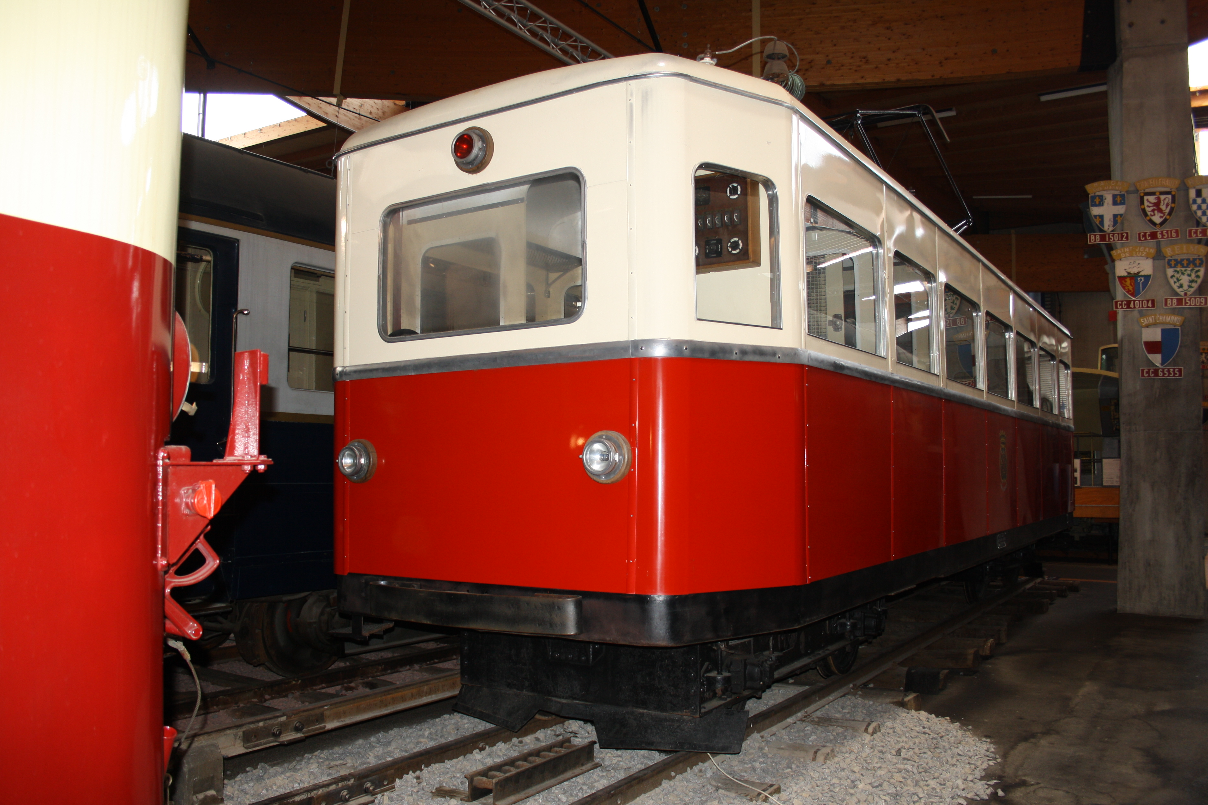 Automotrice de la ligne à crémaillère de Langres à la Cité du Train